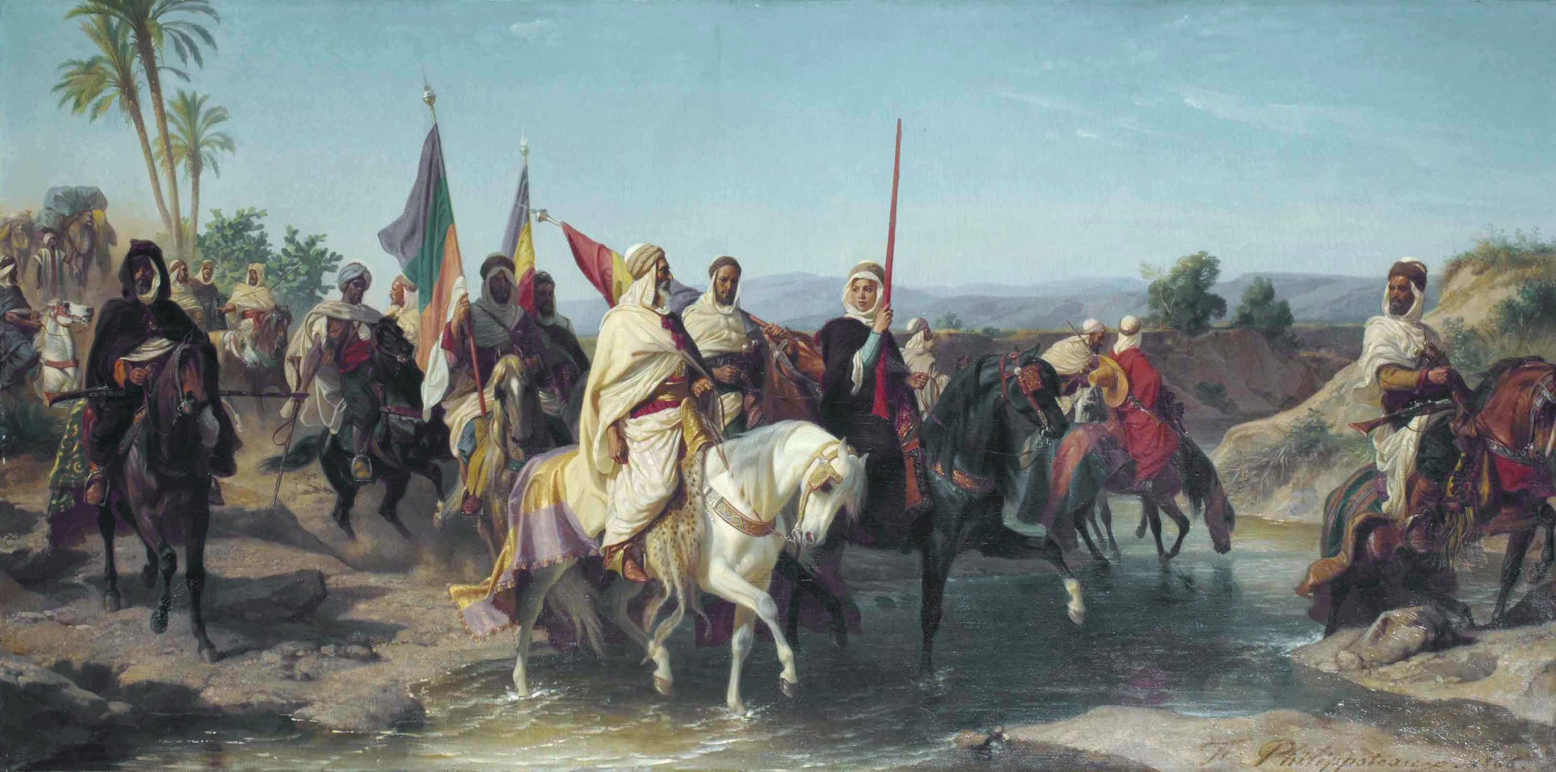 Portraits présumés du Chérif Boubaghla et de Lalla Fatma n'Soumer conduisant l'armée révolutionnaire huile sur toile 81 x 163 cm signé en bas à droite: F Philippoteaux 1866